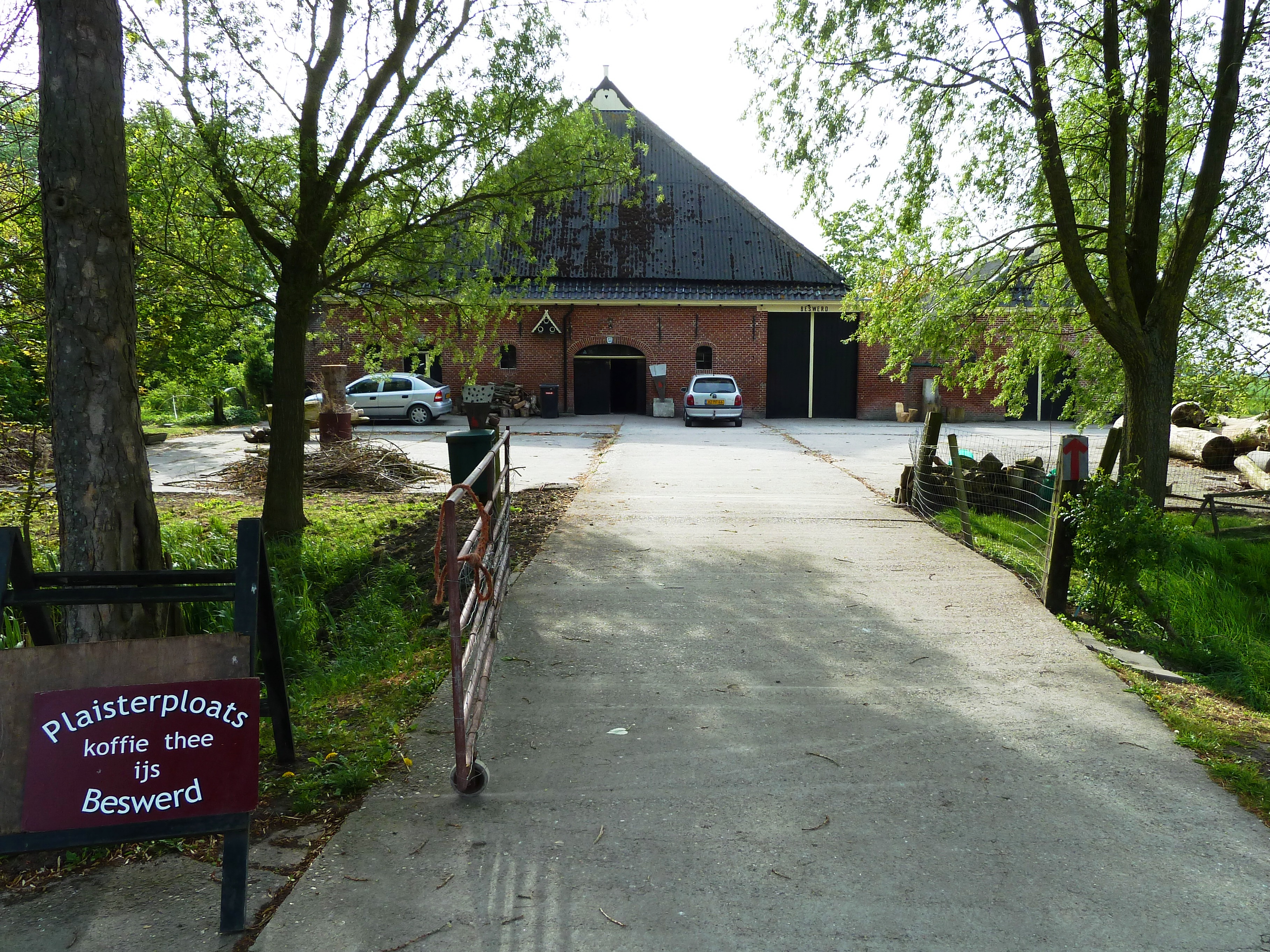 Achterzijde boerderij Groot-Beswerd bij Beswerd (Winsum, Groningen, Nederland).